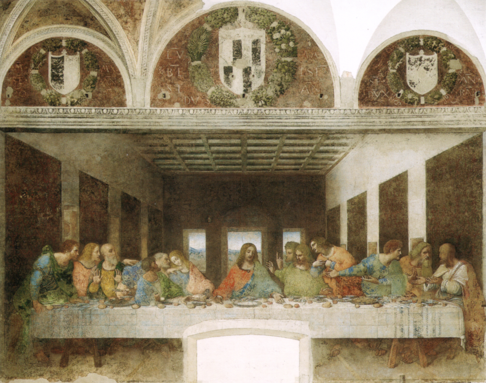 LEONARDO da Vinci (5giugno2012) The Last Supper Mixed technique, 460 x 880 cm Convent of Santa Maria delle Grazie, Milan